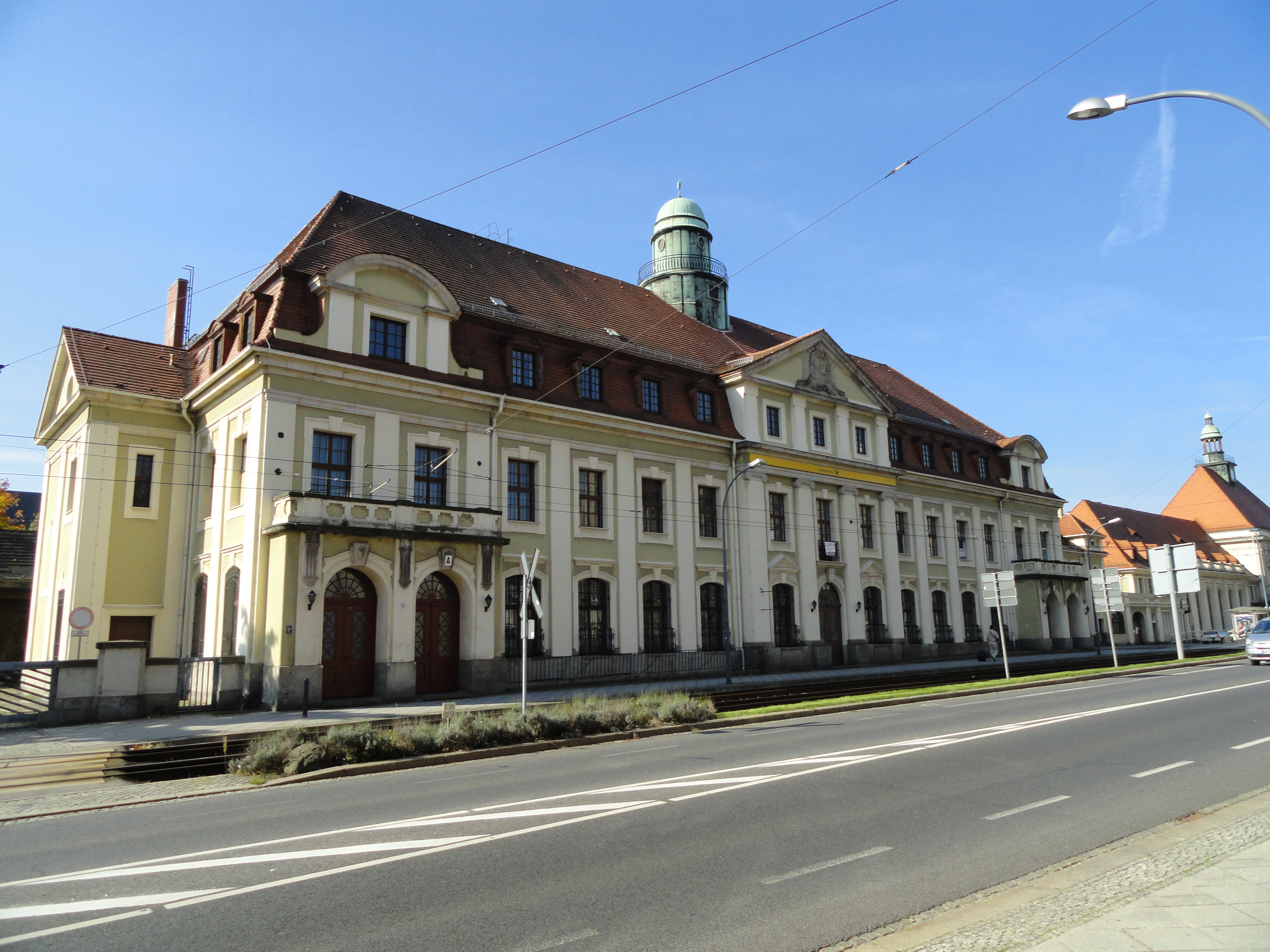 Bahnpostamt östlich des Görlitzer Bahnhofes